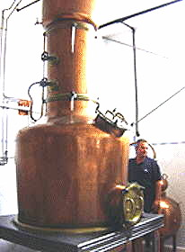 Jordi-dest